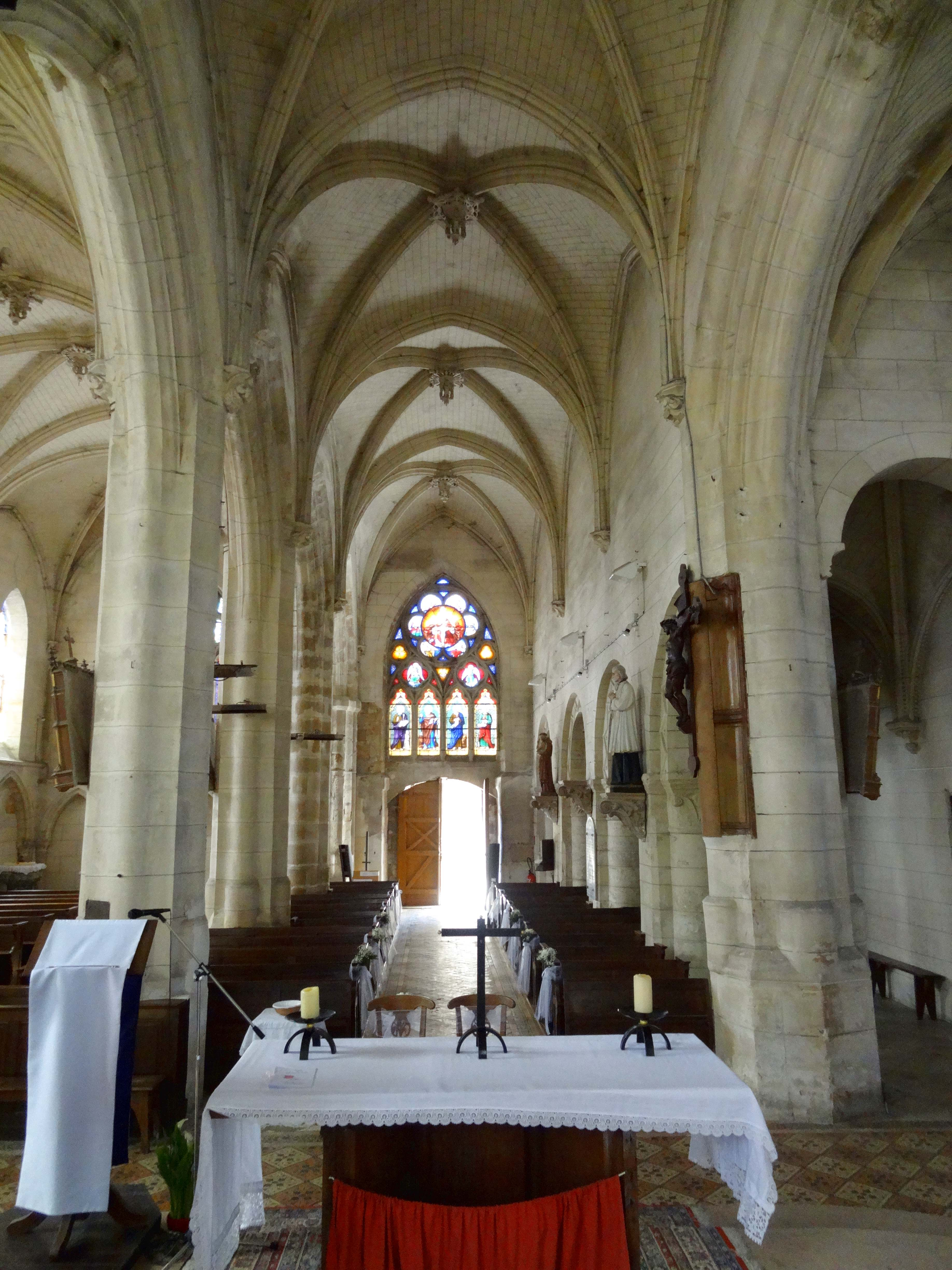 Intérieur de l'église - voir titre.